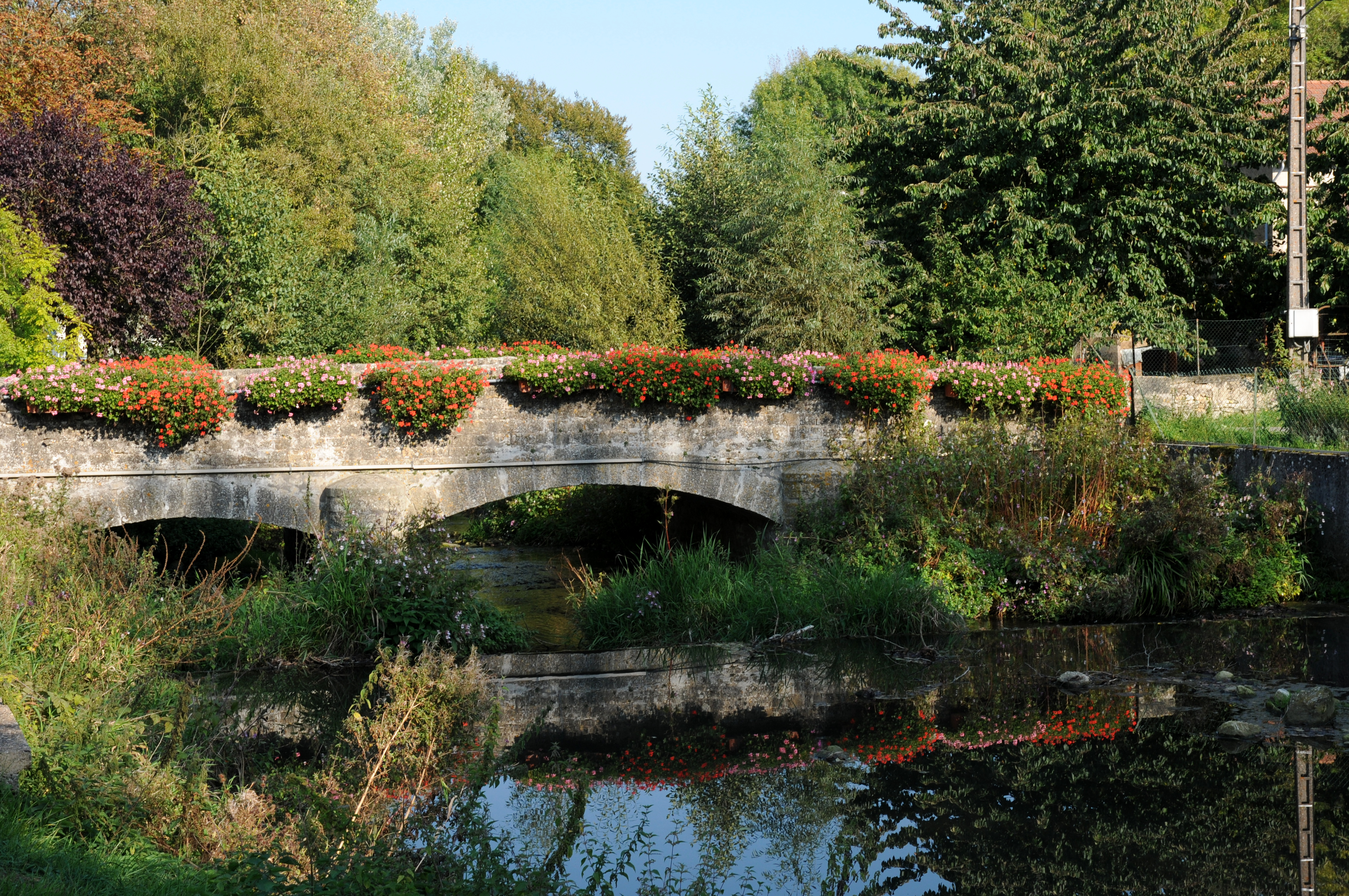 D'Bréck iwwer d'Gander zu Altwis.